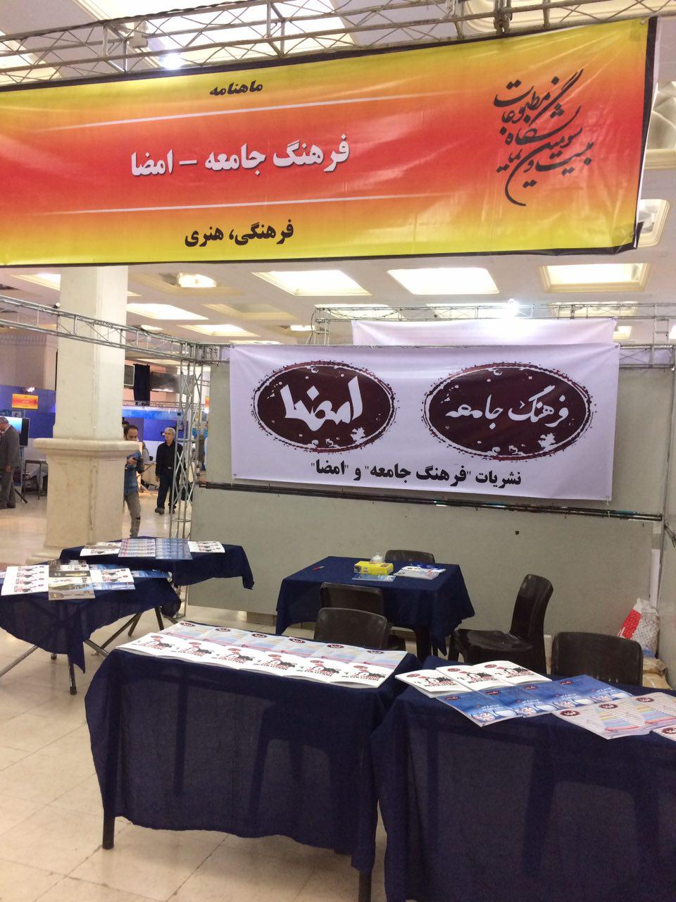 تۆرکجه: فرهنگ جامعه درگیسی و ایمضا فصلنامه‌سی تبریزده نمایشگاهدا